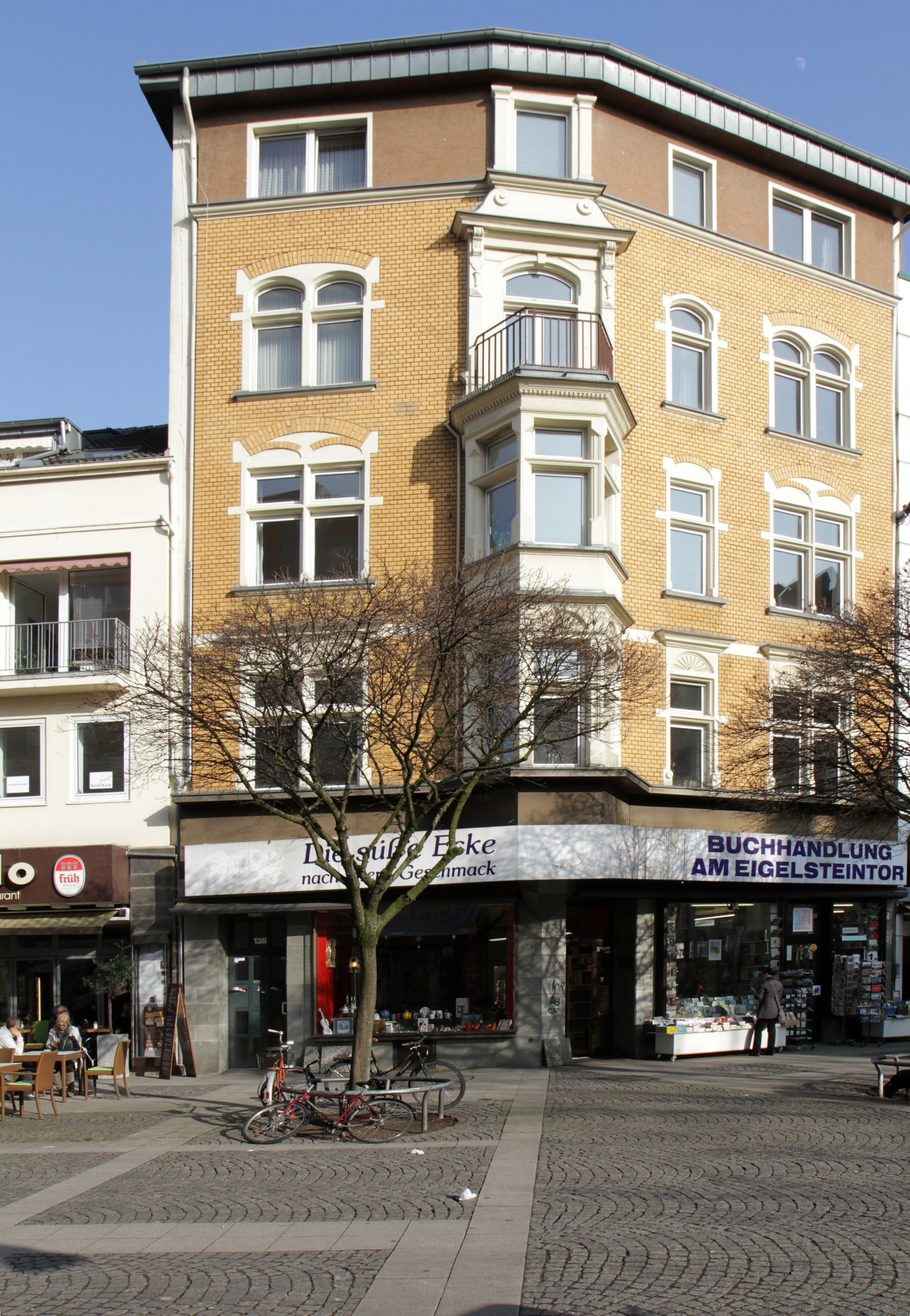 Köln Altstadt-Nord, Eigelstein 126